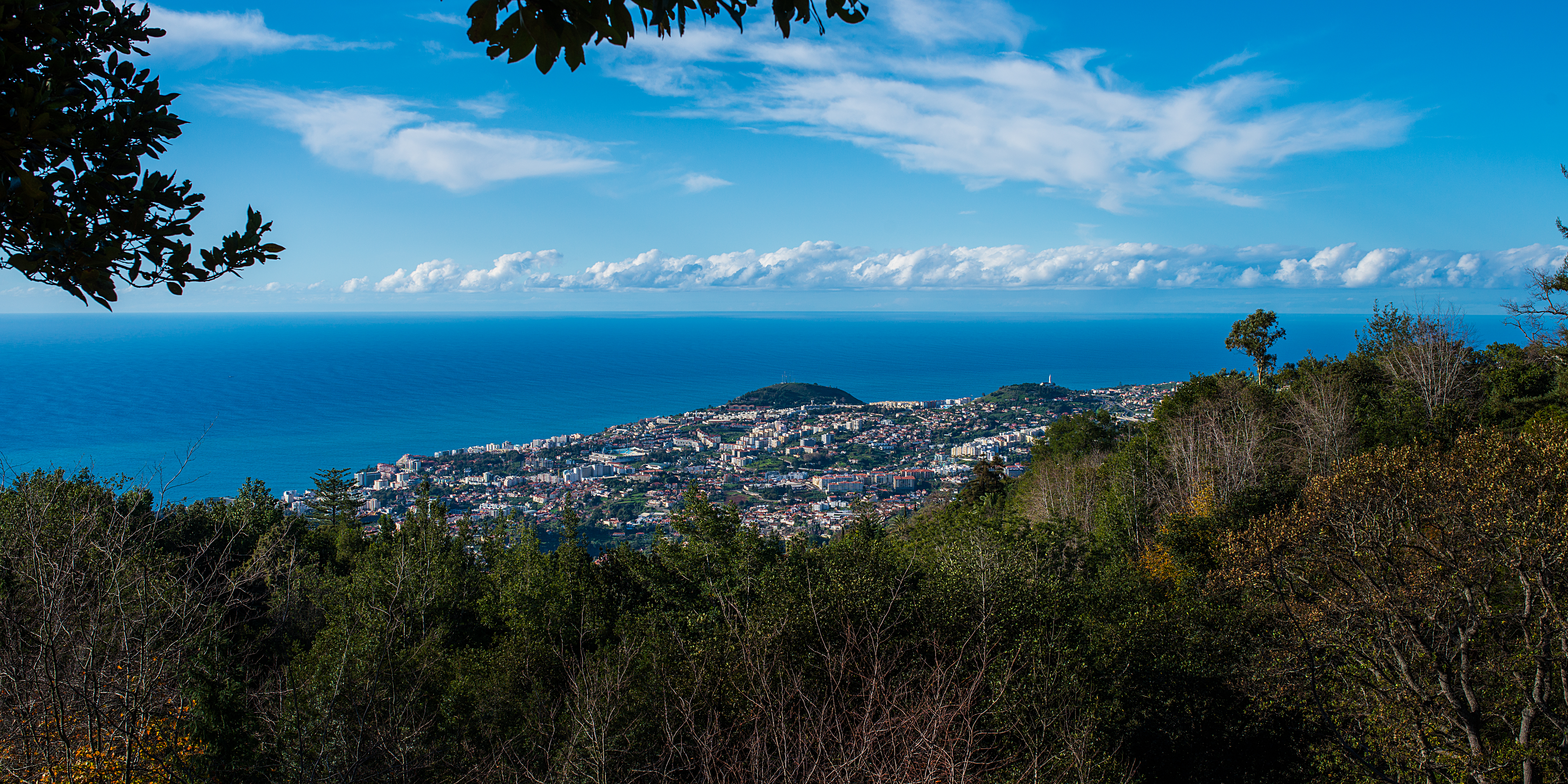 Funchal Madeira Portugal January 2014